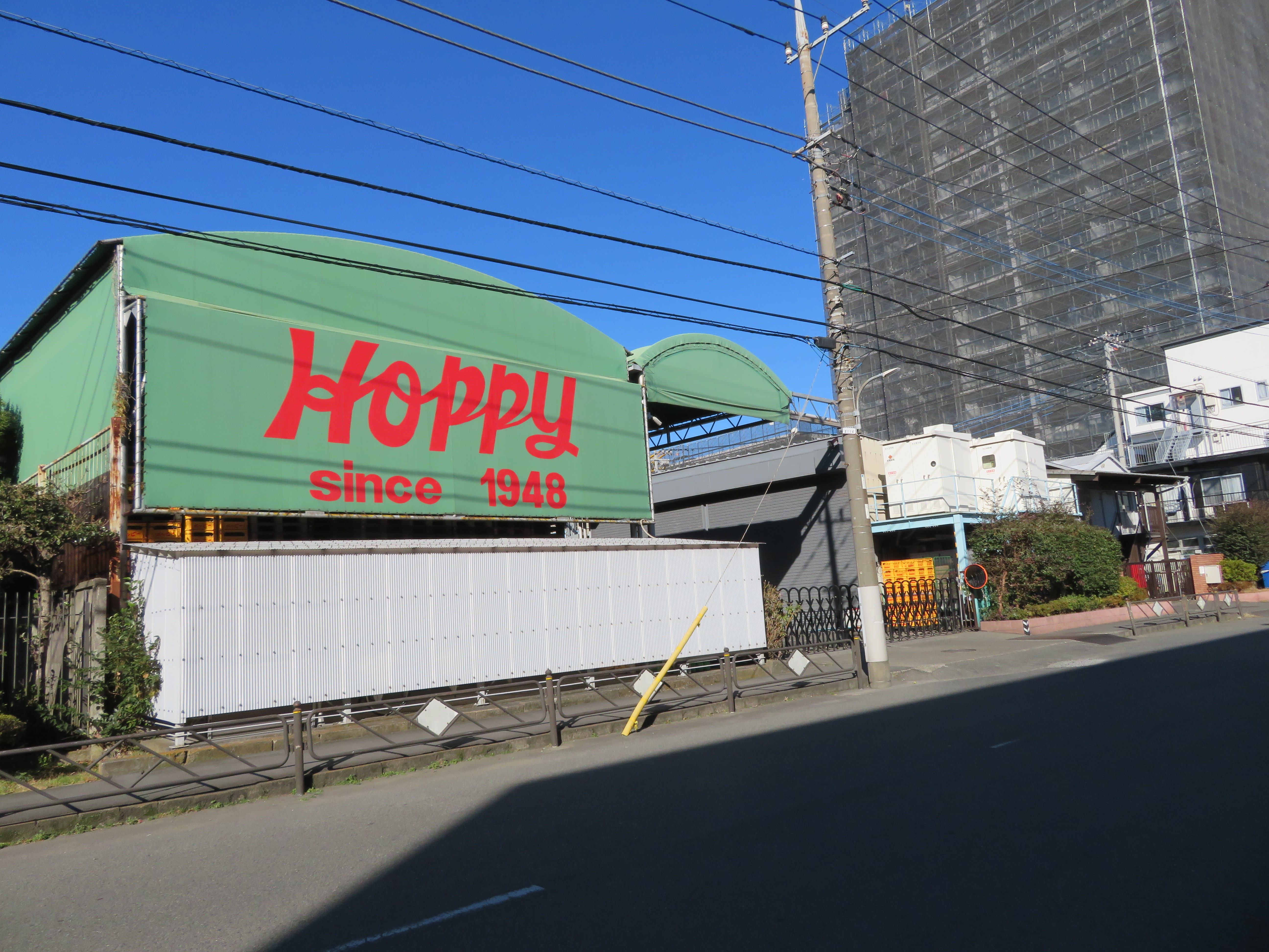 東京都調布市に所在するホッピービバレッジ調布工場（工場東側南寄りから撮影） Canon PowerShot SX720 HS